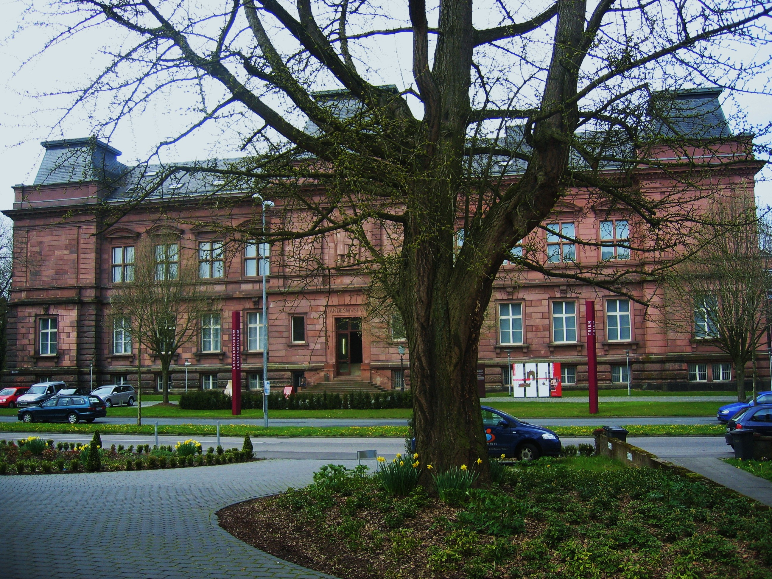 Reinisches Landesmuseum Trier